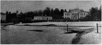 Bogorodskoye Manor